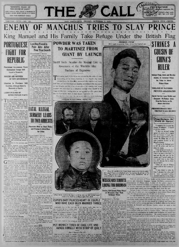 鄺佐治和載洵